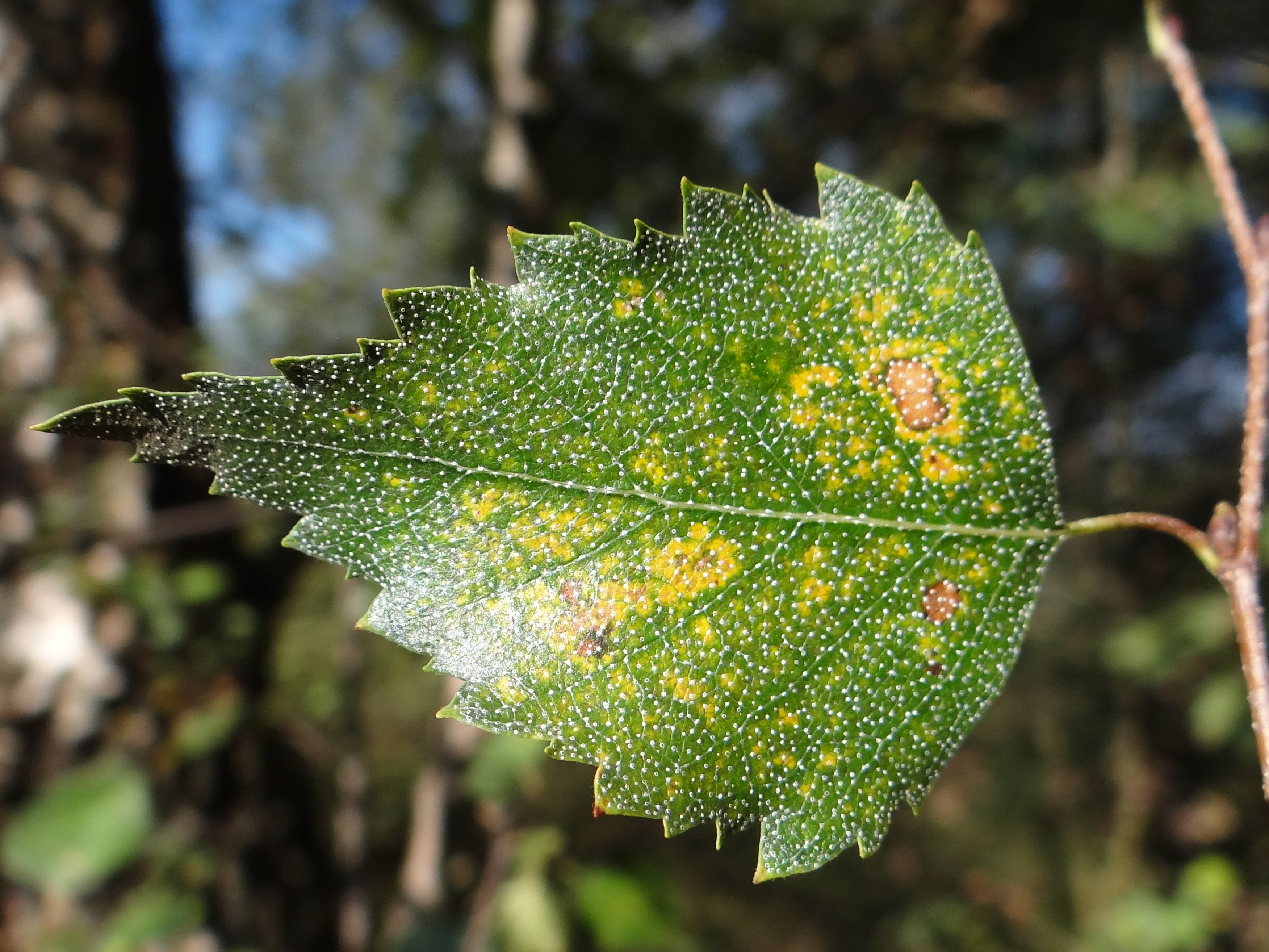 Phyllactinia guttata on leaf Betula verrucosa